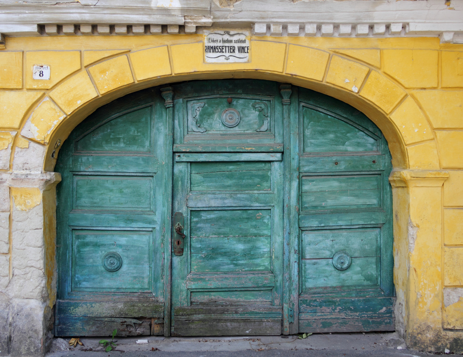 ún. "Ramasetter-ház" (Sümeg, Deák Ferenc u. 8.) This is a photo of a monument in Hungary, Identifier: 10297